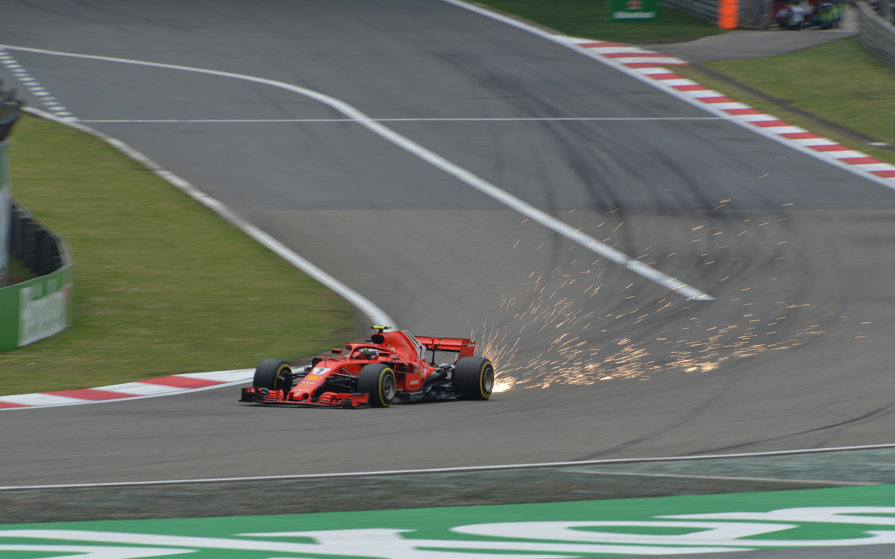 Ferrari